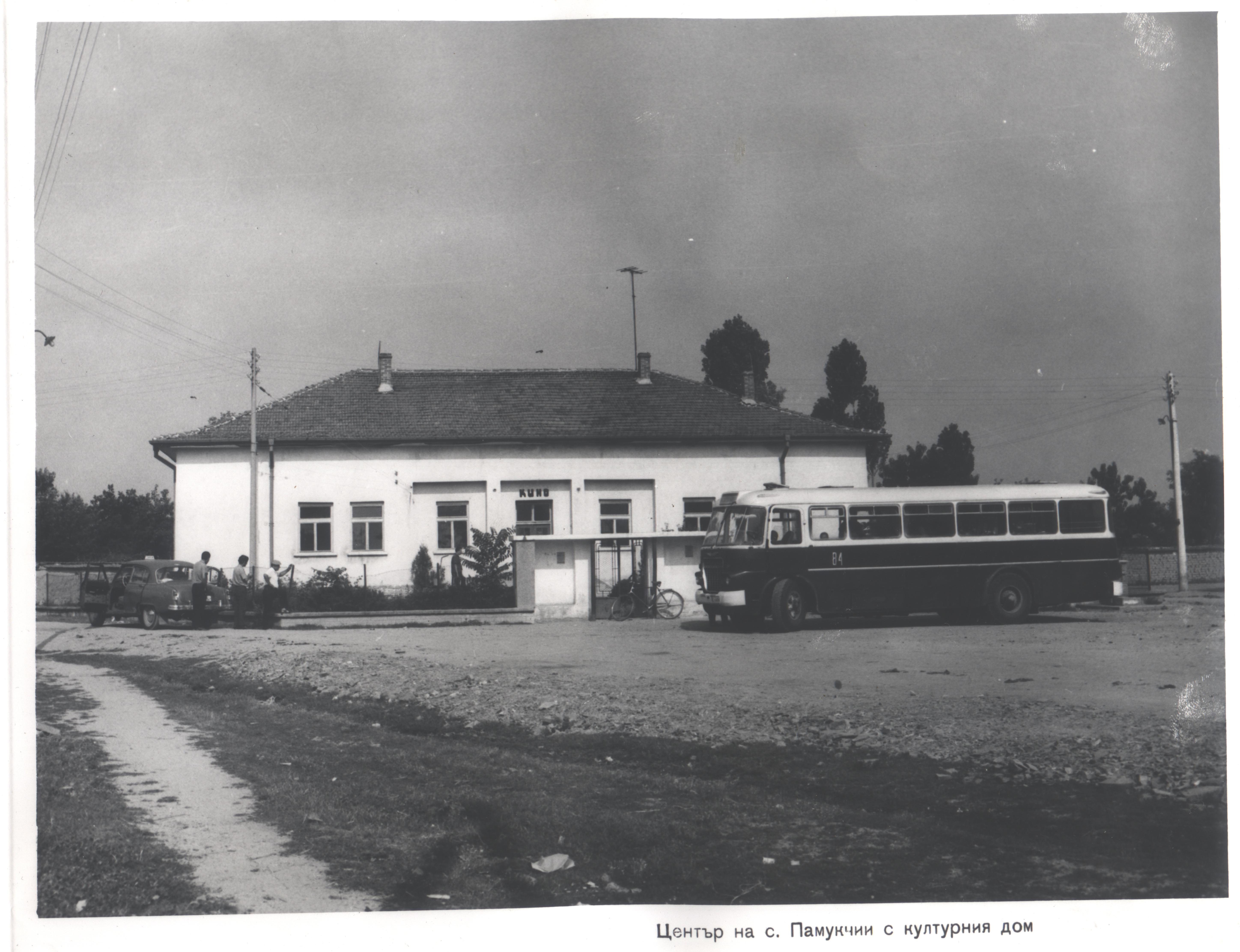 Център на село Памукчий